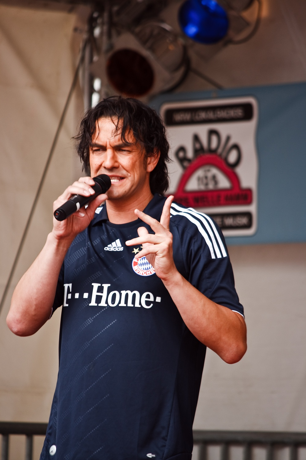 Comedy Live, Datum/Uhrzeit: 27.06.2009 17:04:58